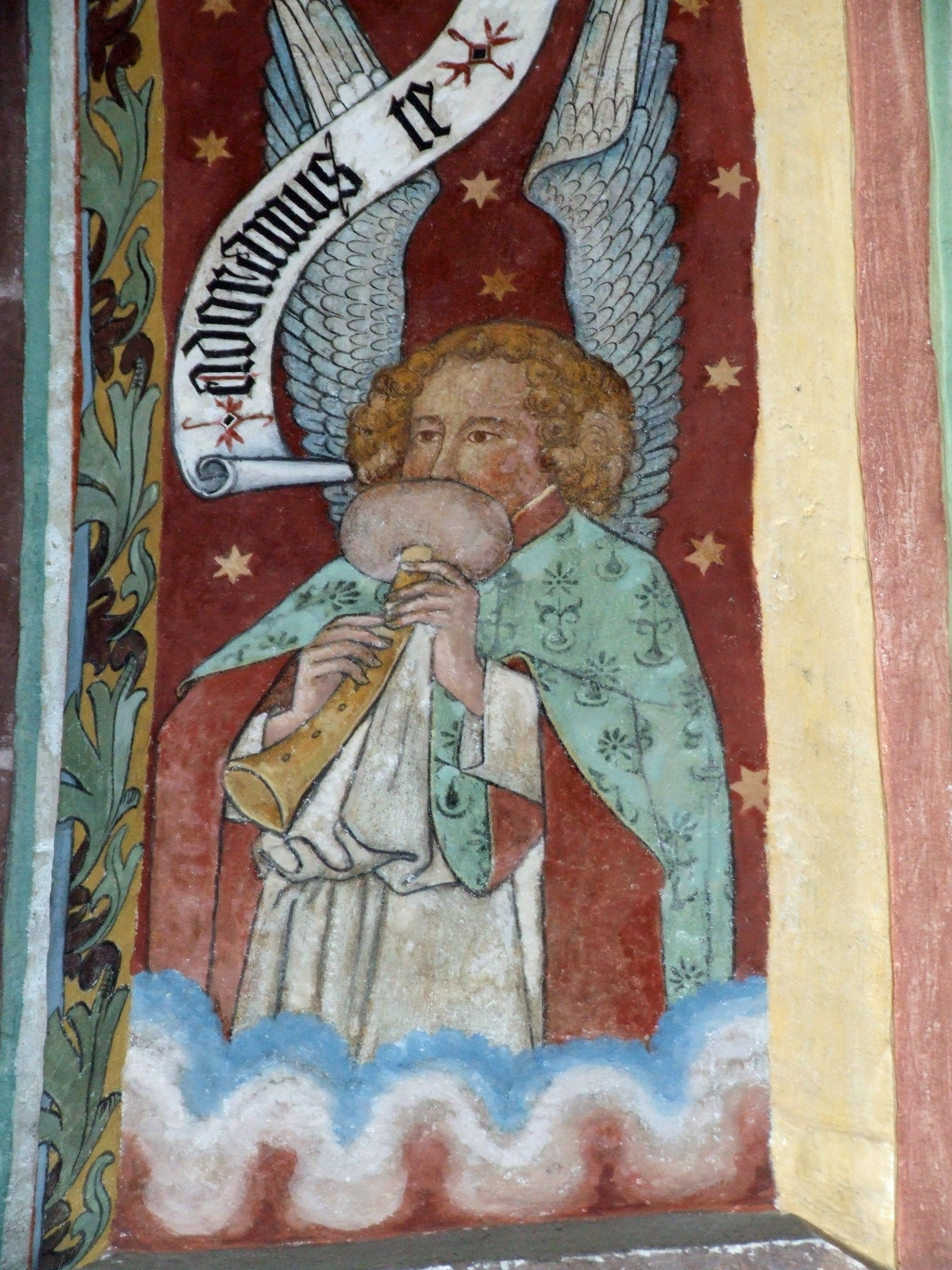 Unser Frauen in Memmingen, Rippenfresko, Engel mit Platerspiel (5. Bogen: Ost)